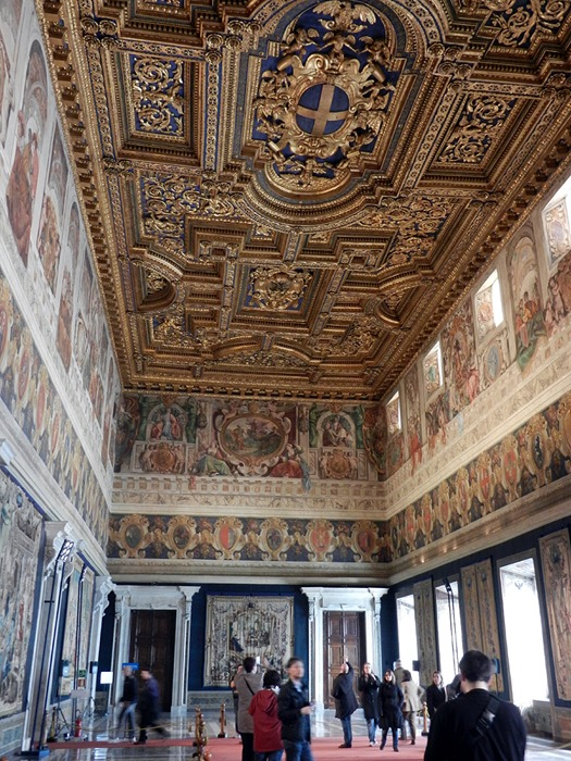 Roma - Salone dei Corazzieri realizzato da Carlo Maderno nel Palazzo del Quirinale